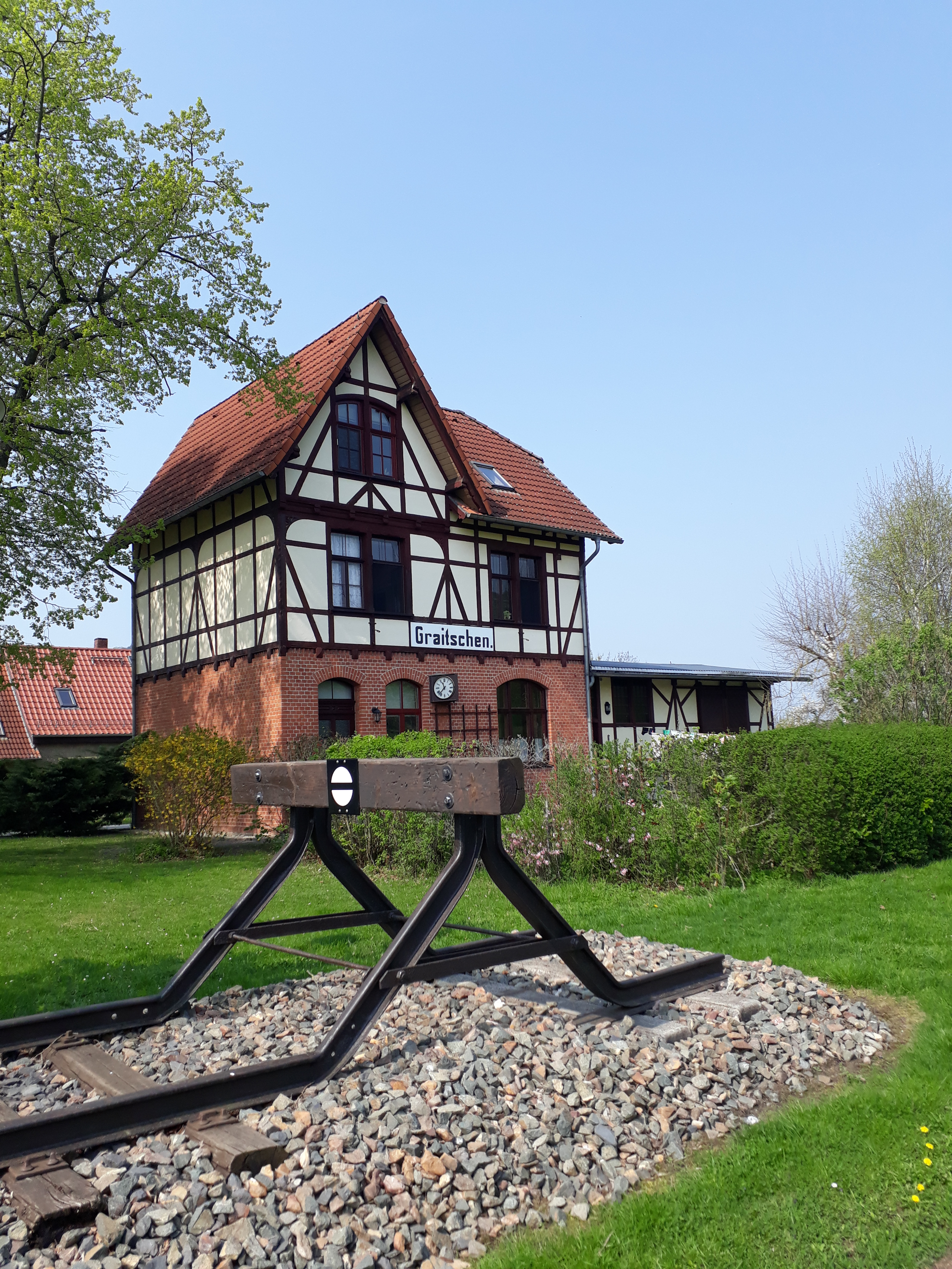 Bahnhof Graitschen bei Bürgel, Thüringen